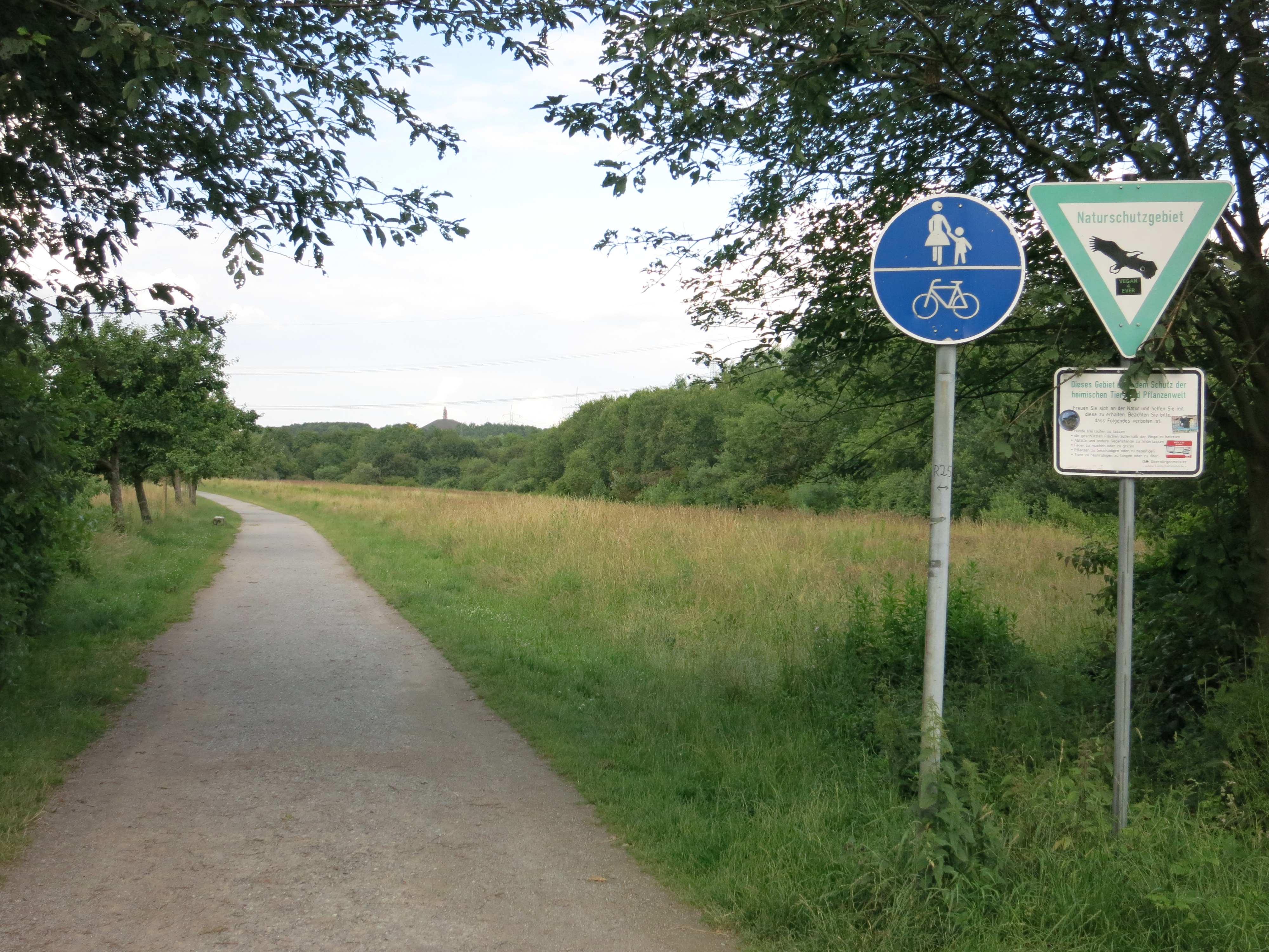 Naturschutzgebiet Mechtenberg (Gelsenkirchen) (GE-017) – Spazierweg